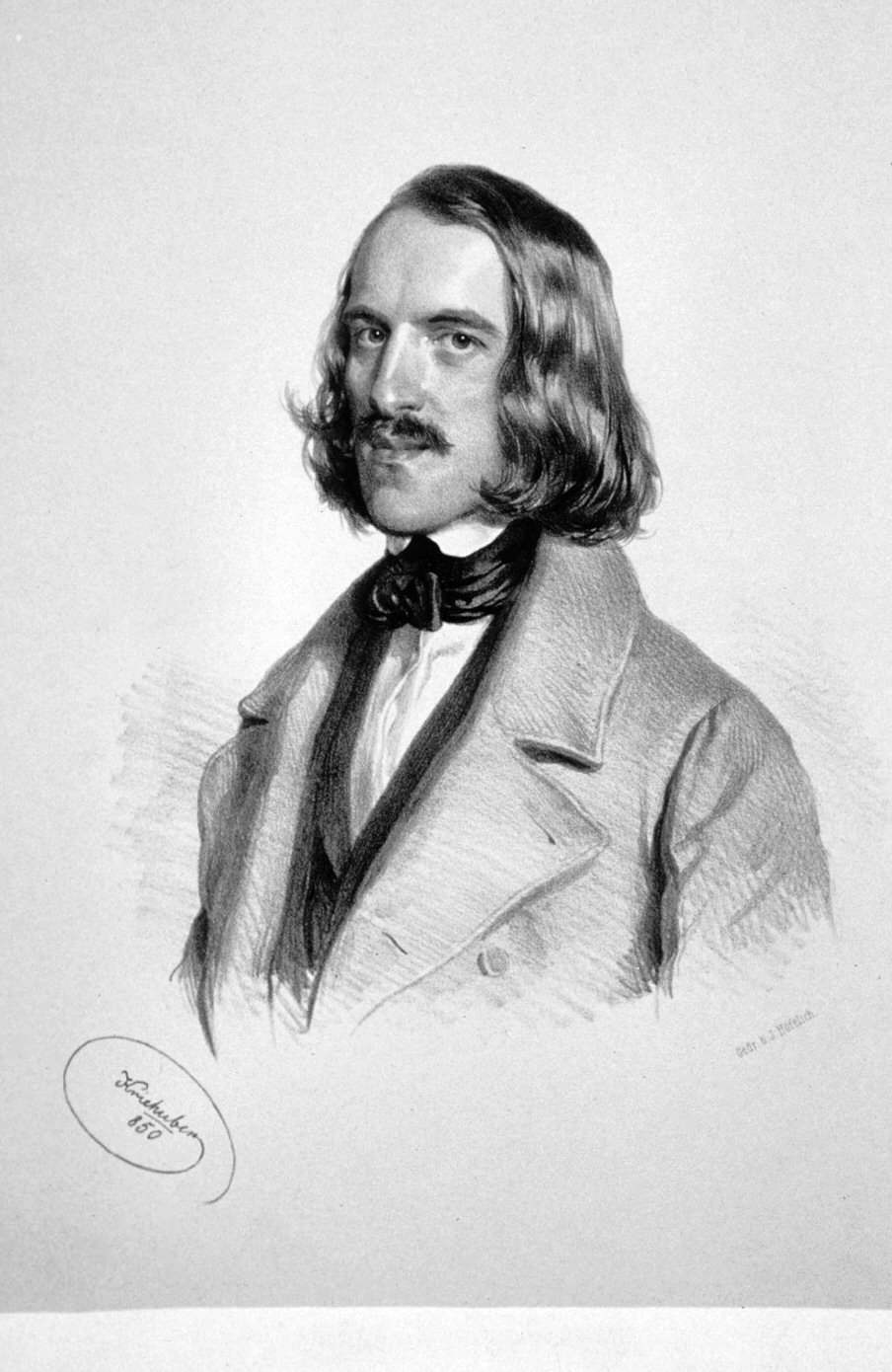 Walther Wolfgang von Goethe (1818-1885), Enkel von Johann Wolfgang von Goethe, Komponist. Lithographie von Josef Kriehuber, 1850